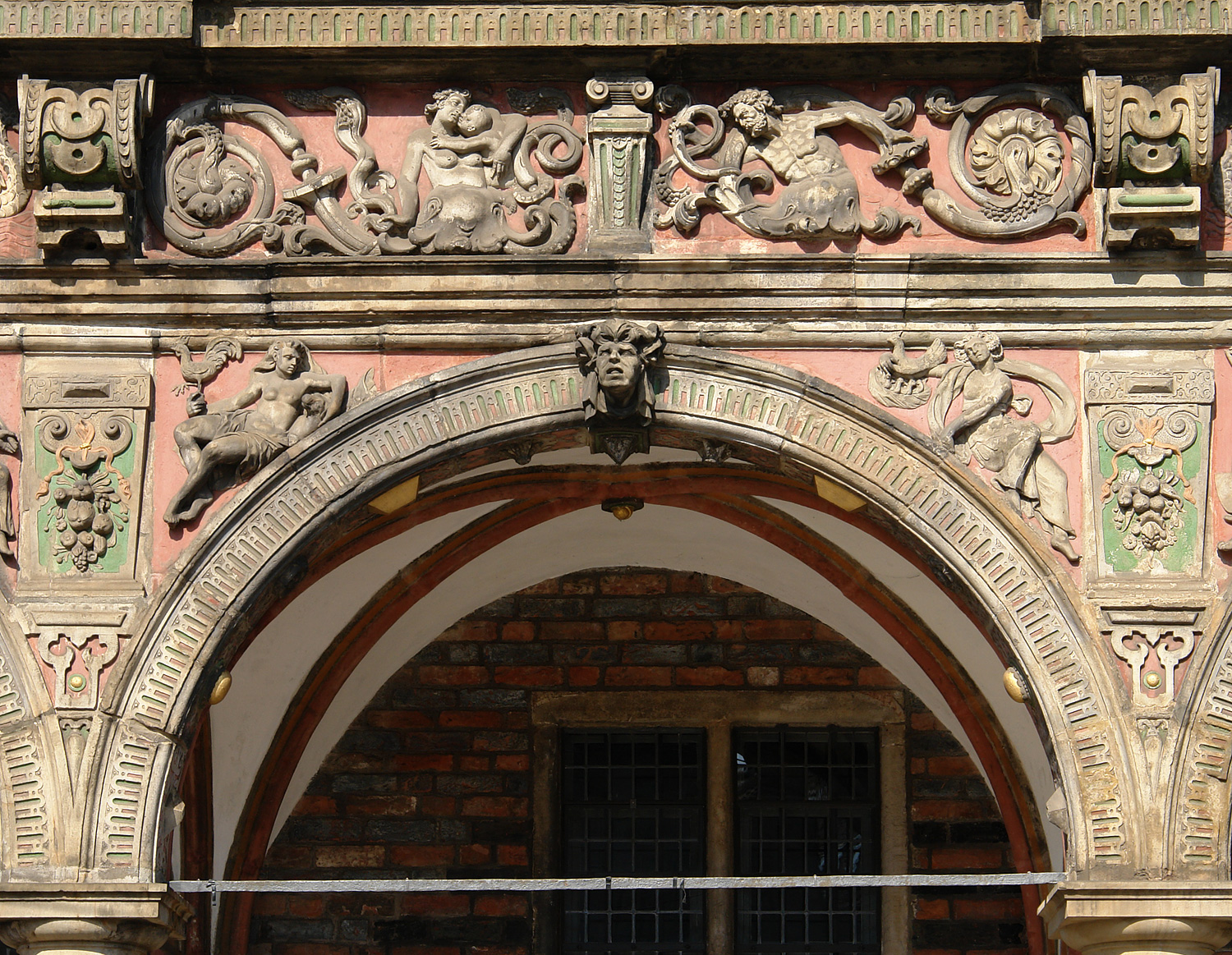 Rathaus in Bremen. Zwickelreliefs im zweiten Arkadenbogen: Vigilantia (Hahn) und Custodia (Gluckhenne)